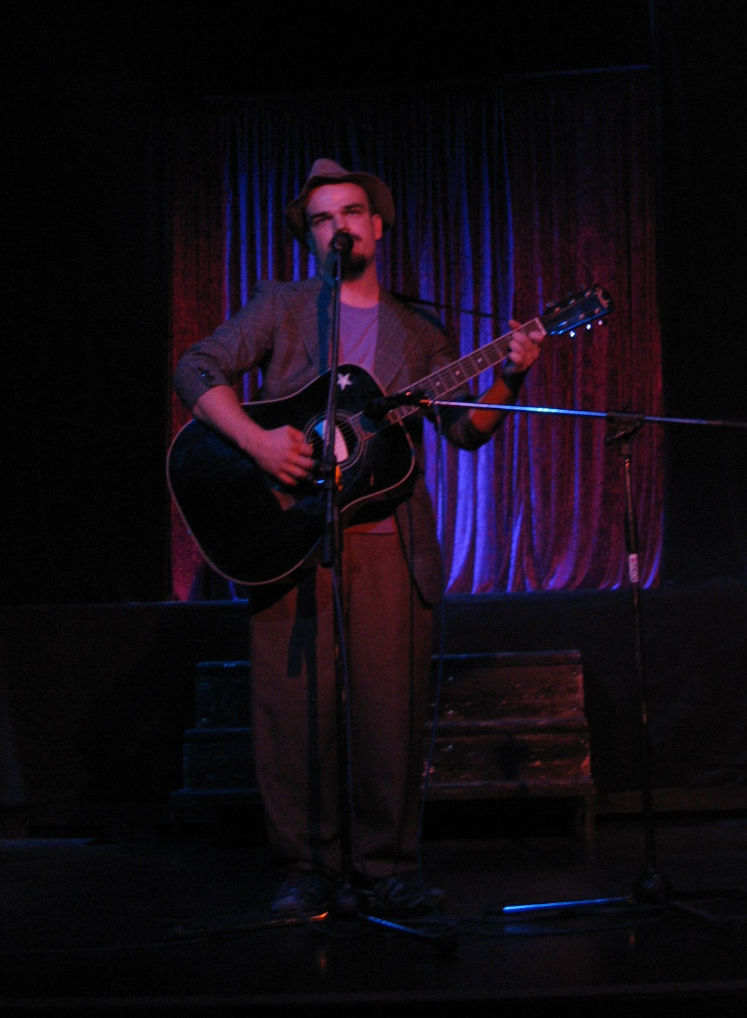 Fotografija zmagovalca na Improviziji leta 2004 - Jure Karas s pesmijo Moj Tomos.